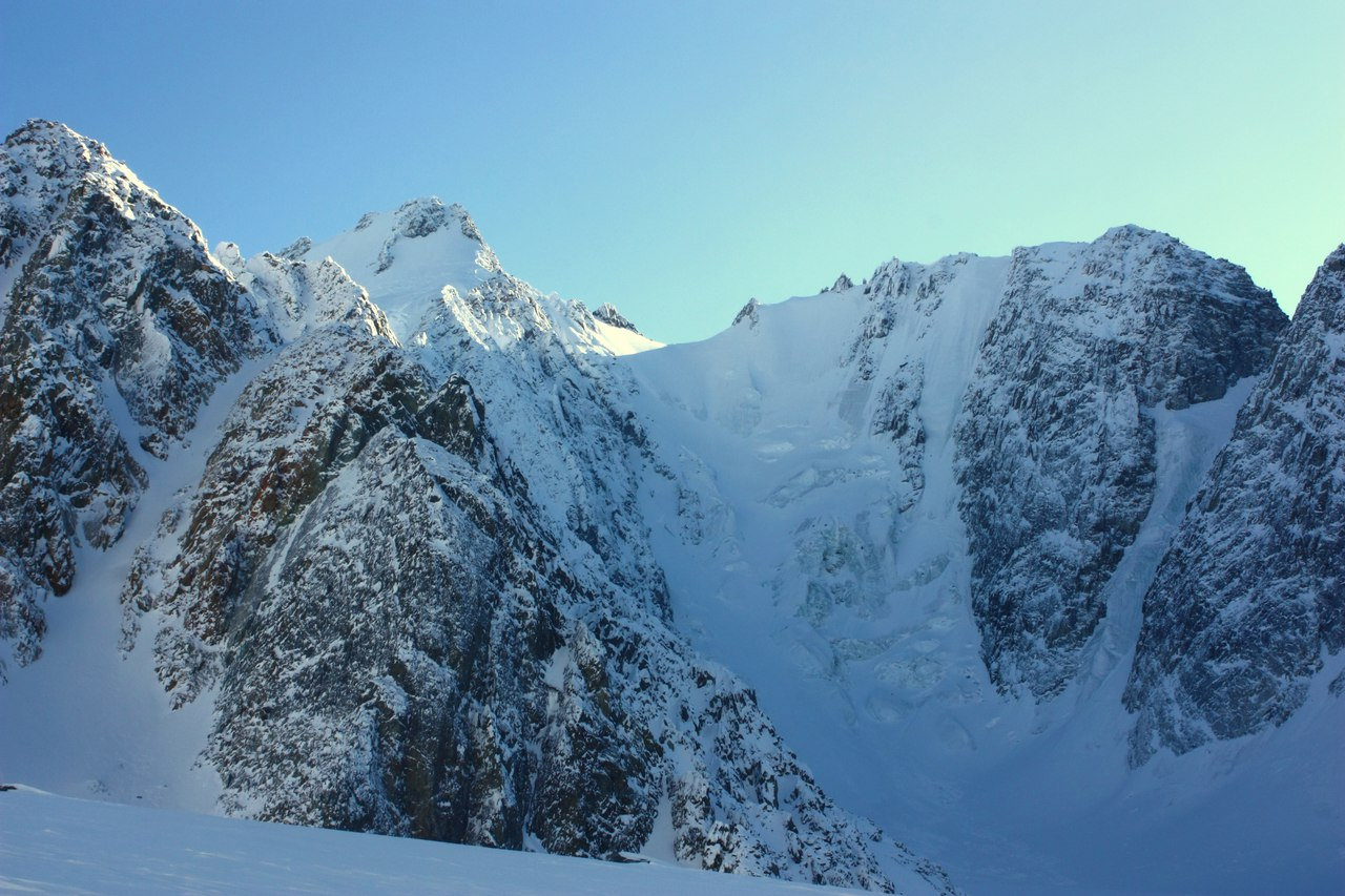 Гора Победа, Момский район, Якутия. Входит в хребет Черского